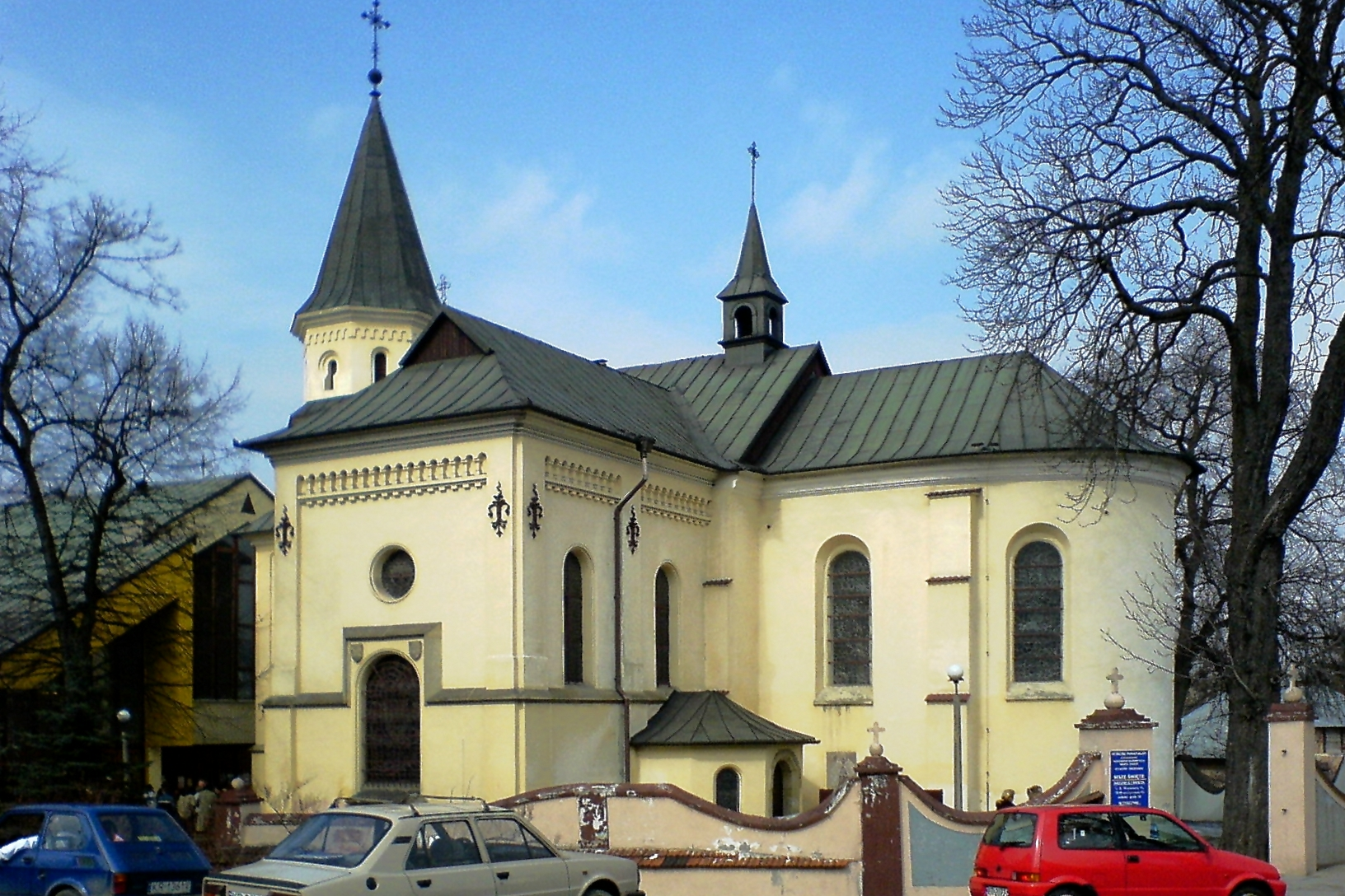 Stary kościół parafialny Kraków Bieżanów